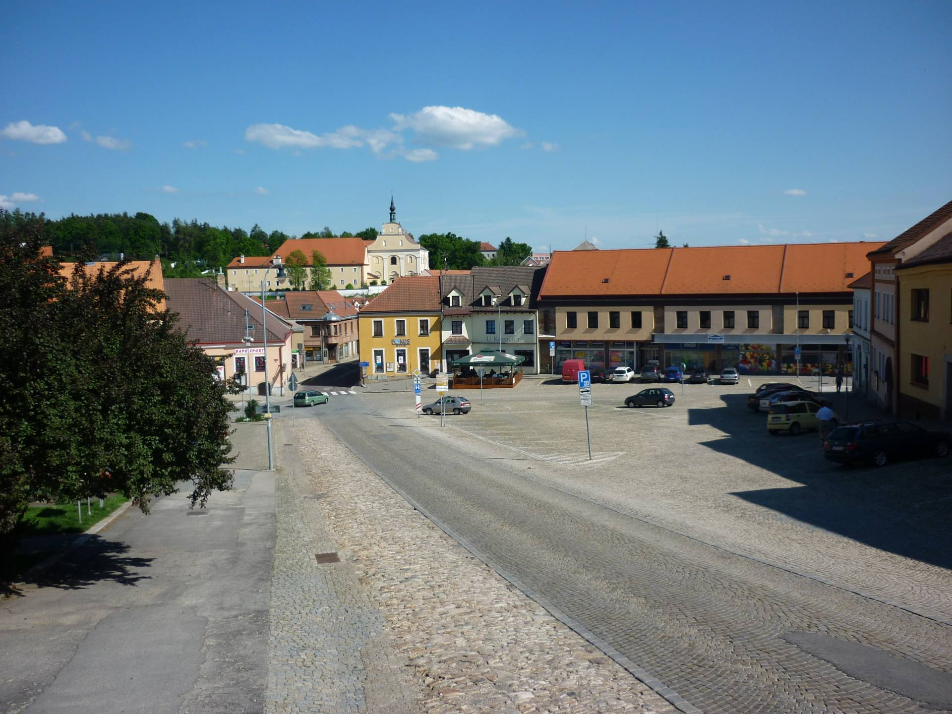 Palackého náměstí v Dačicích